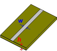 Միկրոշերտավոր գիծ